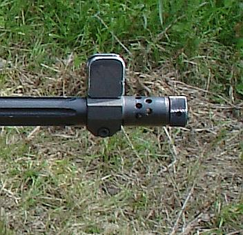 Mündungsaufsatz des G22. Modifikation der Bundeswehr. Trägt den Schalldämpfer und das Notkorn. Dient als Ersatzvisier bei Ausfall des Zielfernrohrs.